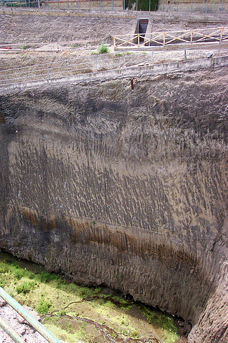 שכבת הטוף בהרקולנאום שעובייה כעשרים מטרים. טוף בעובי 20 מטרים בהרקולנאום.